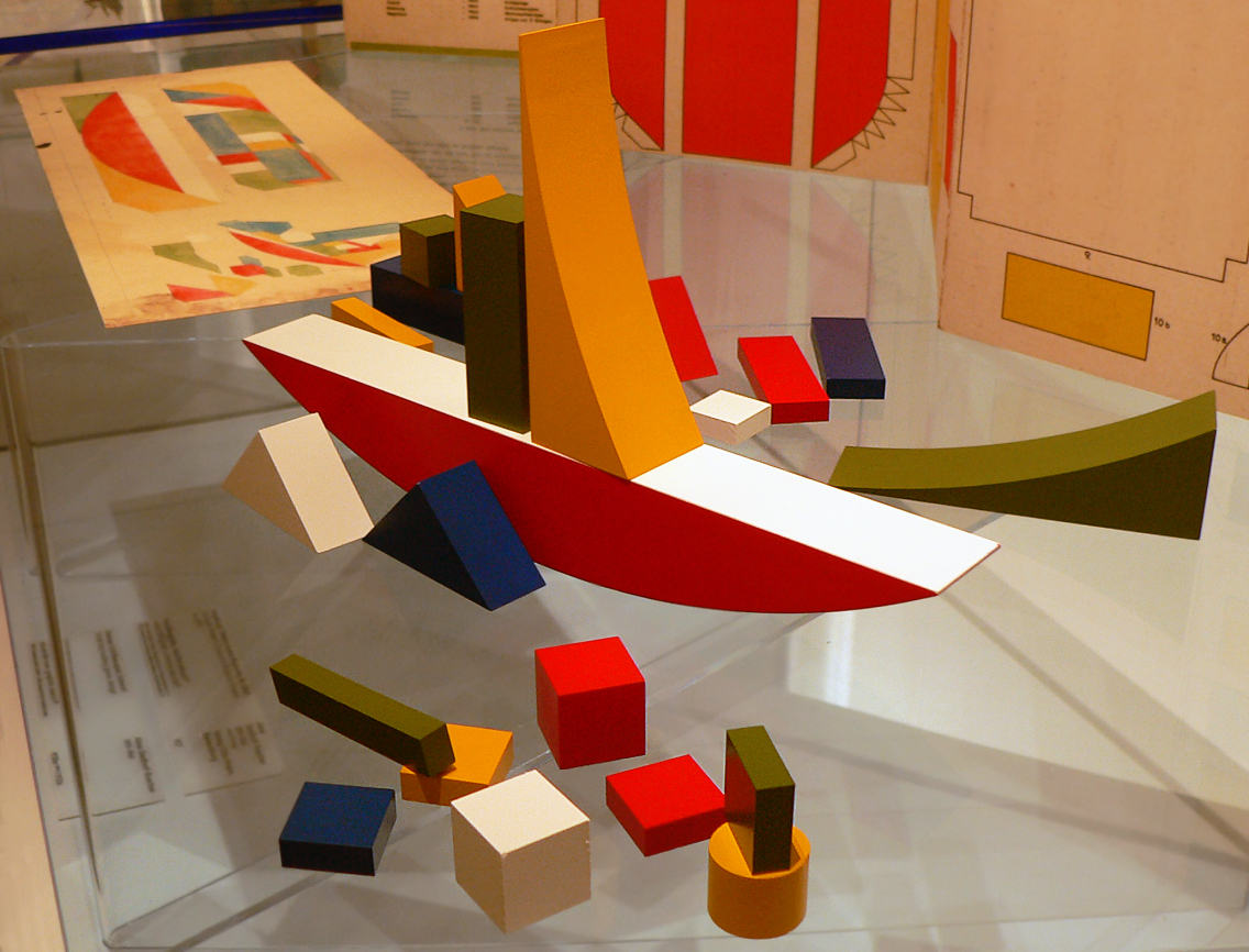 Schiffbauspiel von Alma Siedhoff-Buscher im Bauhaus-Museum Weimar